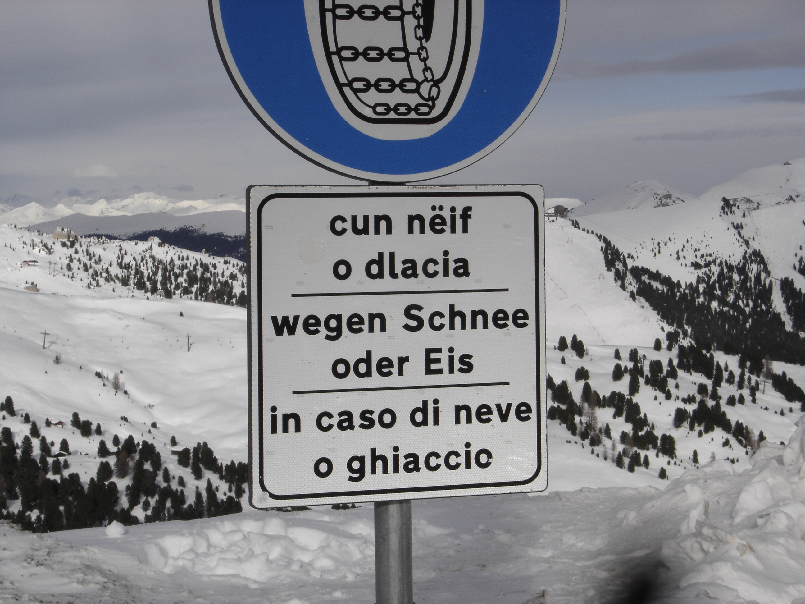 Inscription trilingue ladin-allemand-italien au Tyrol méridional